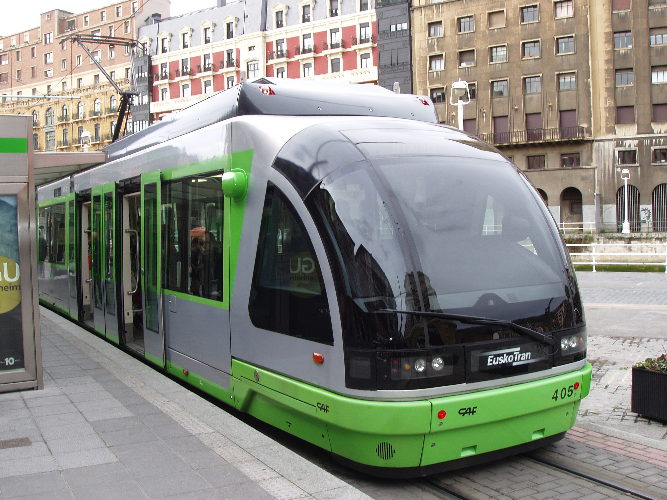 Tram in Bilbao, Spain